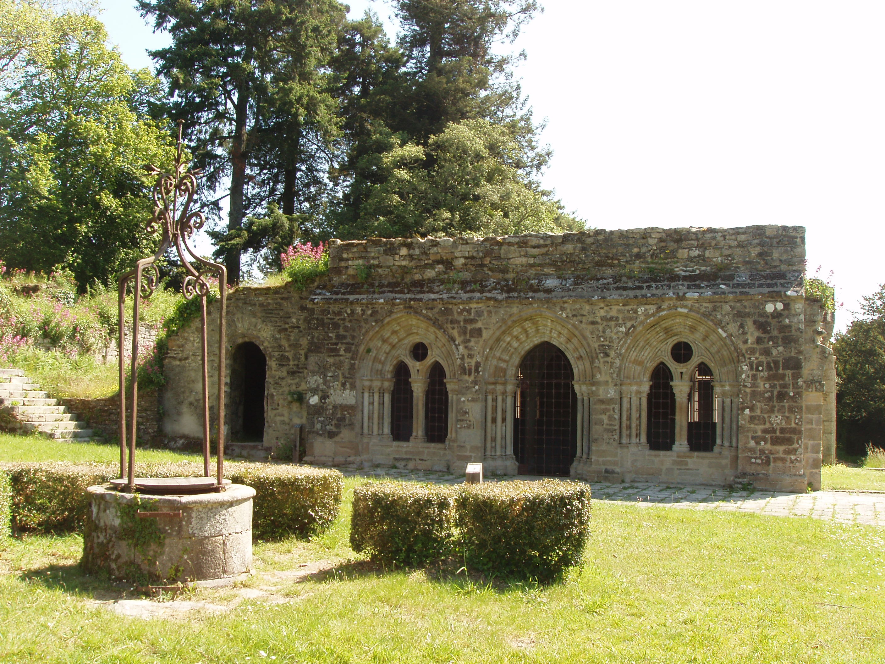 salle capitulaire du XIII siècle